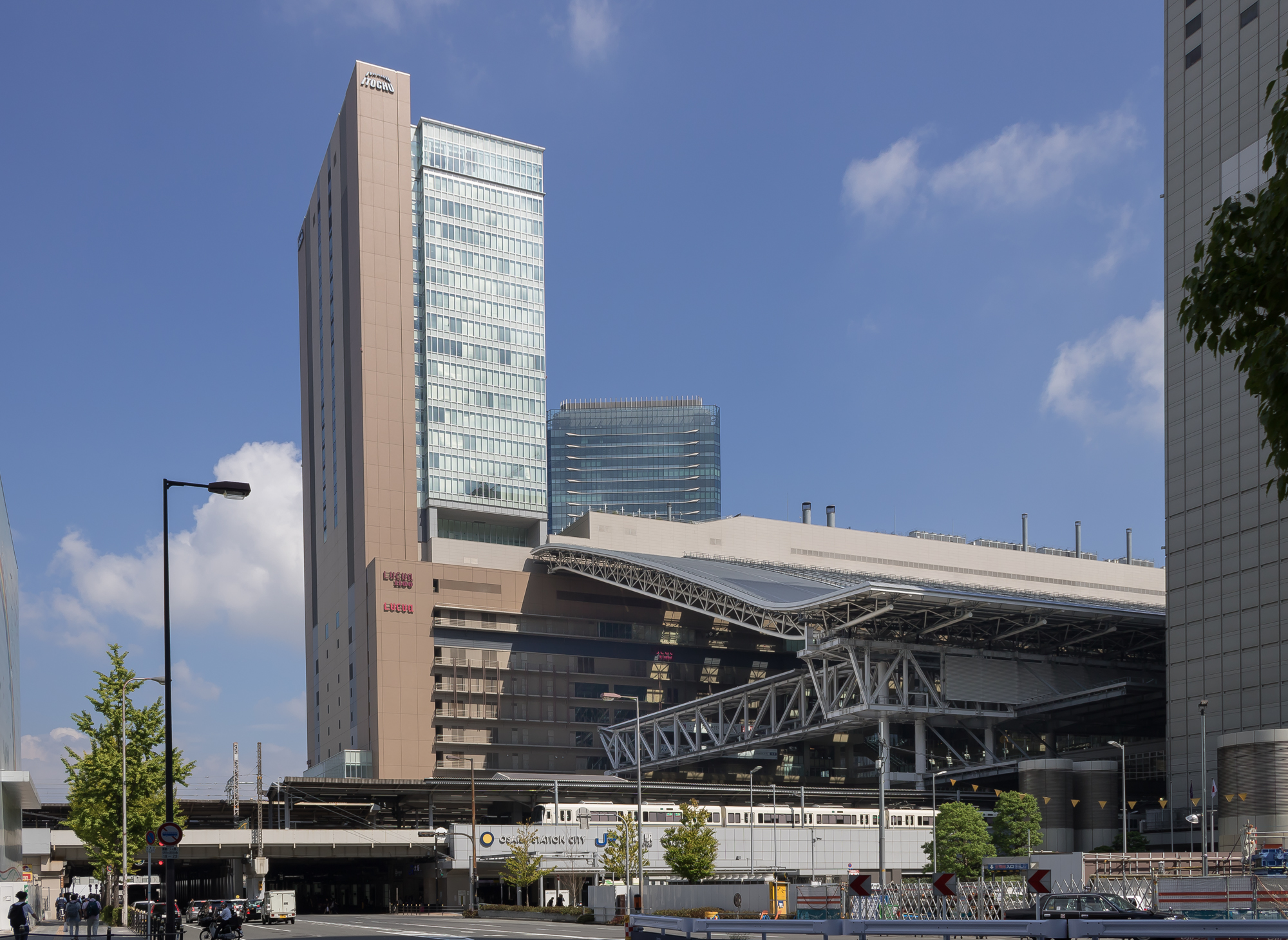 ノースゲートビルディング オフィスタワー、伊藤忠商事大阪本社。